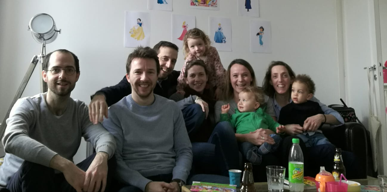 Cousinade